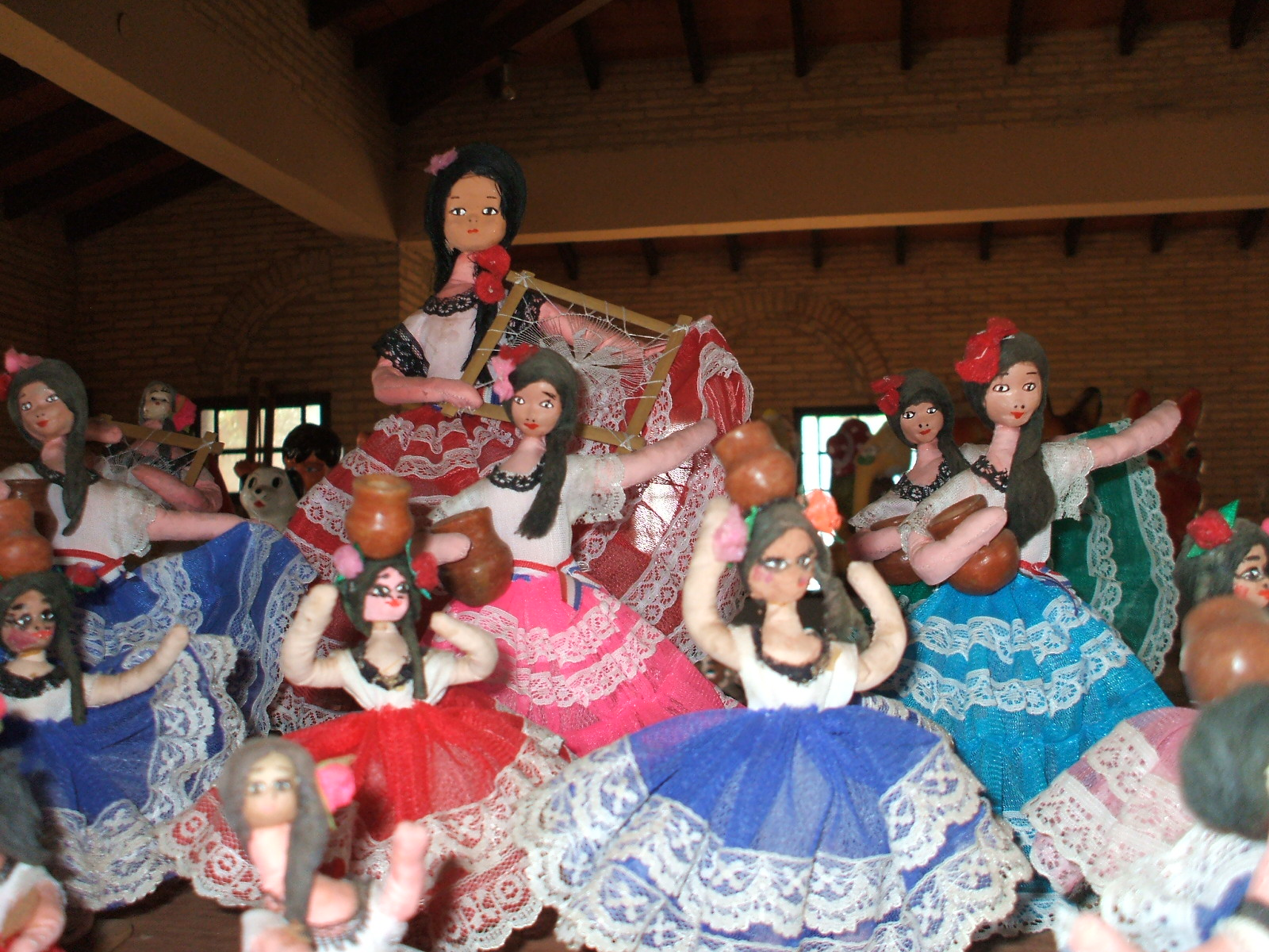 Bailarinas